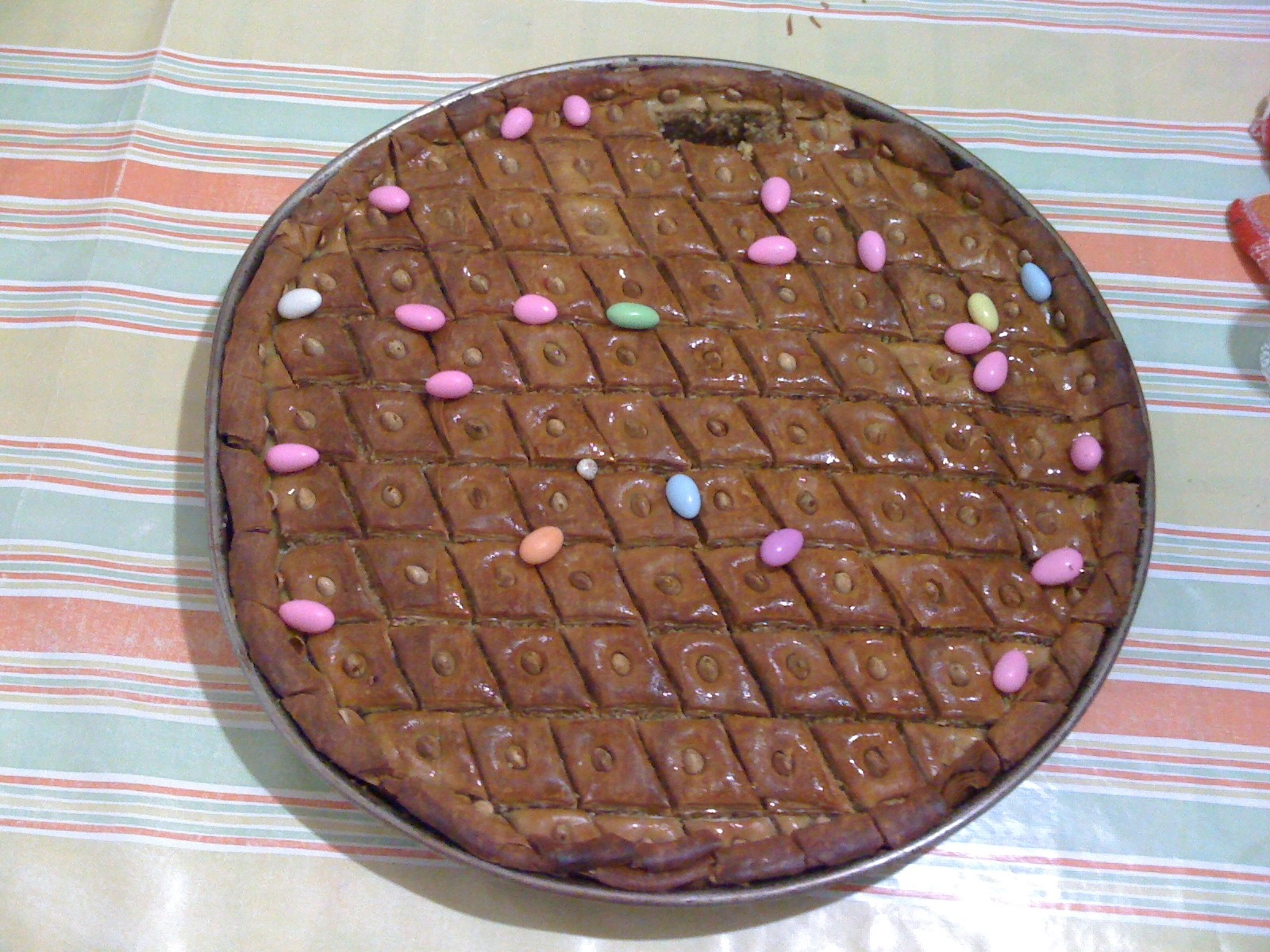 Plat de baklaoua algérienne